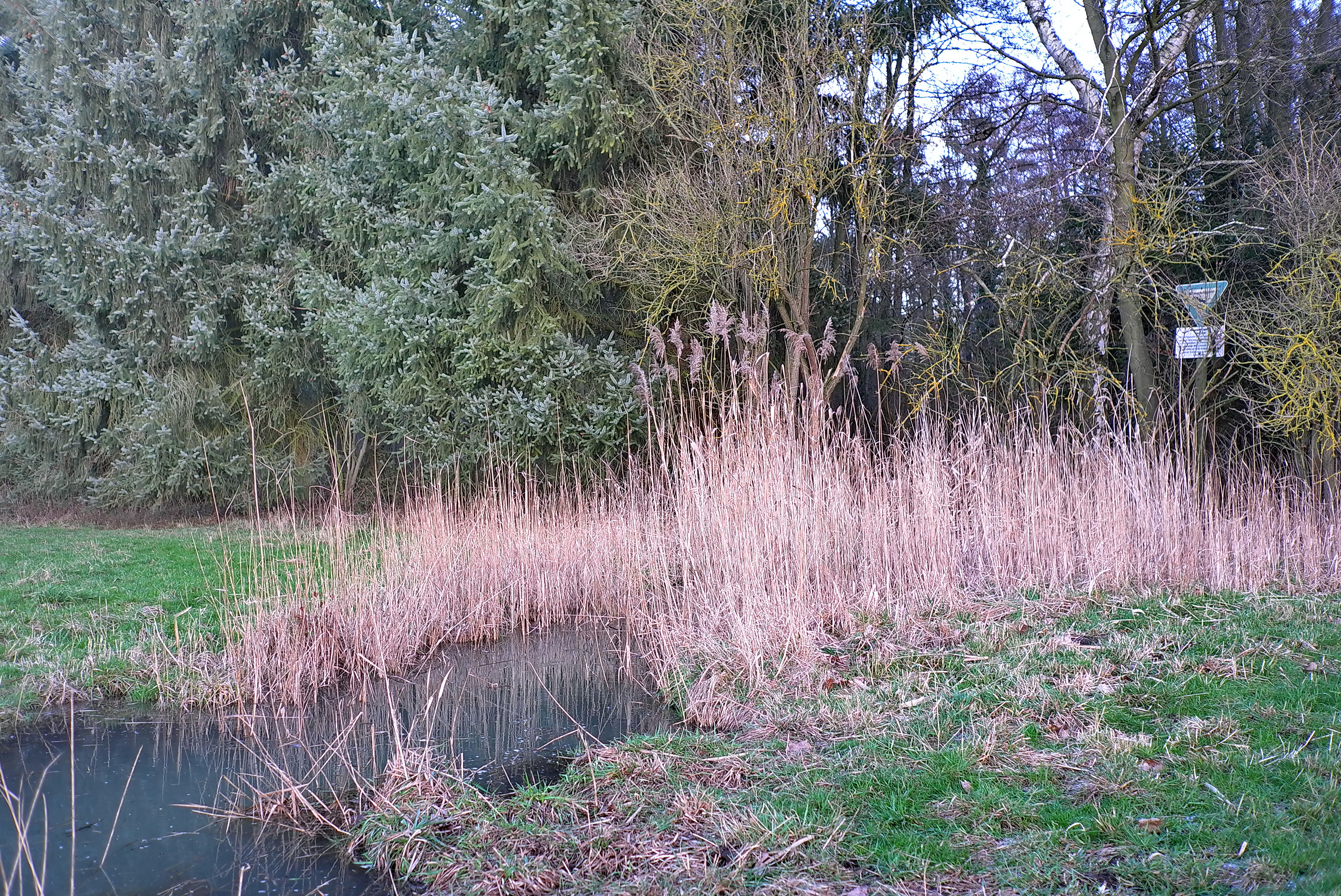 NSG „Hengster“ in Hessen: Bachlauf im Hengster (Winter). Die Geschichte des „Hengsters“ von 1884 bis 1969 wurde in zwei Büchern dokumentiert. 1821 wurde das Areal südlich der heutigen Umgehungsstraße entlang der Autobahn als „botanisches Schatzkästlein“ entdeckt. Es zog Forscher aus der ganzen Welt an. Heute ist der Hengster ein trockener Bruchwald mit Erlen und Birken.